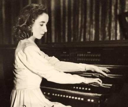 Demessieux en Salle Pleyel.